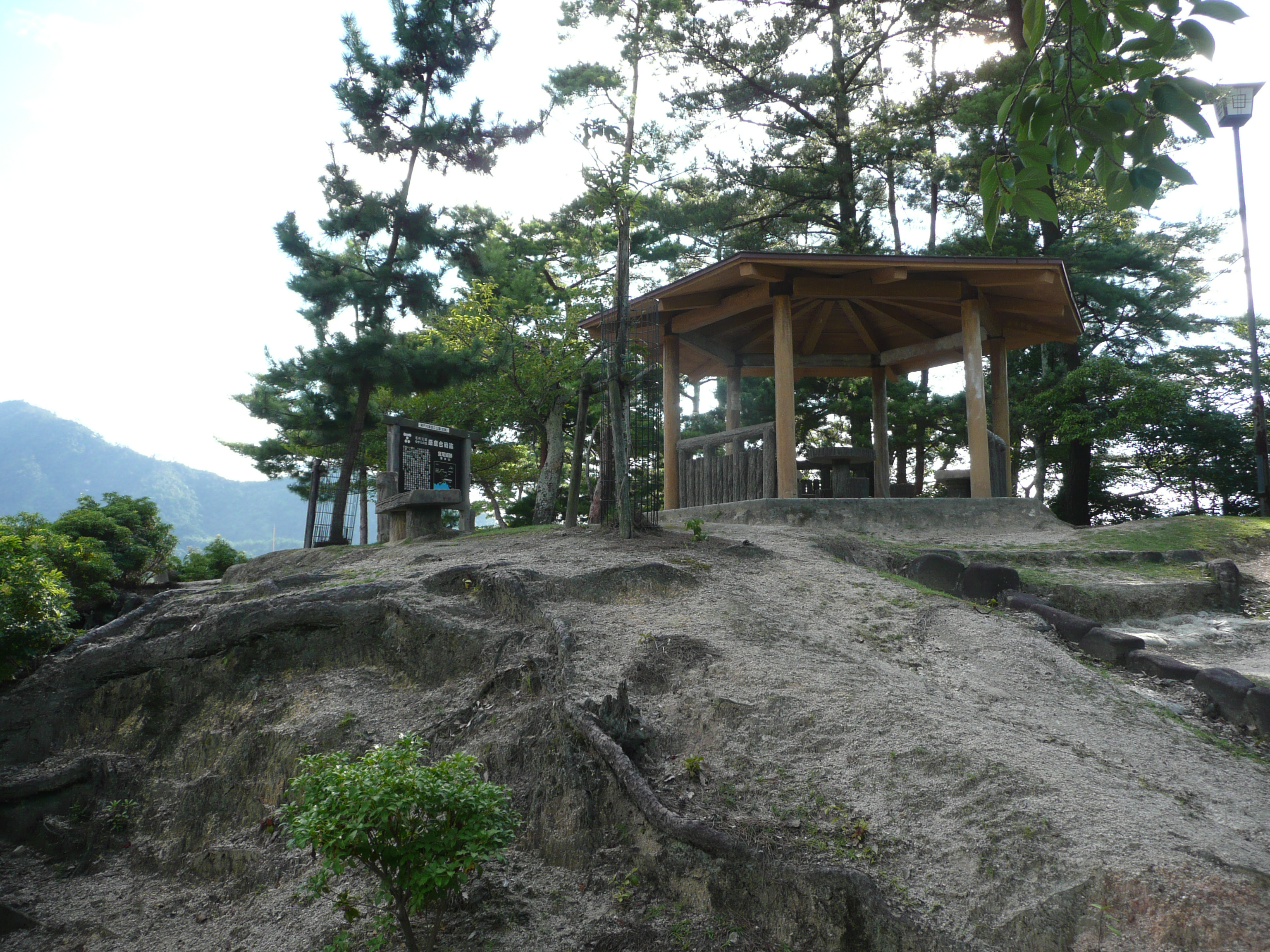 宮尾城の本丸跡。